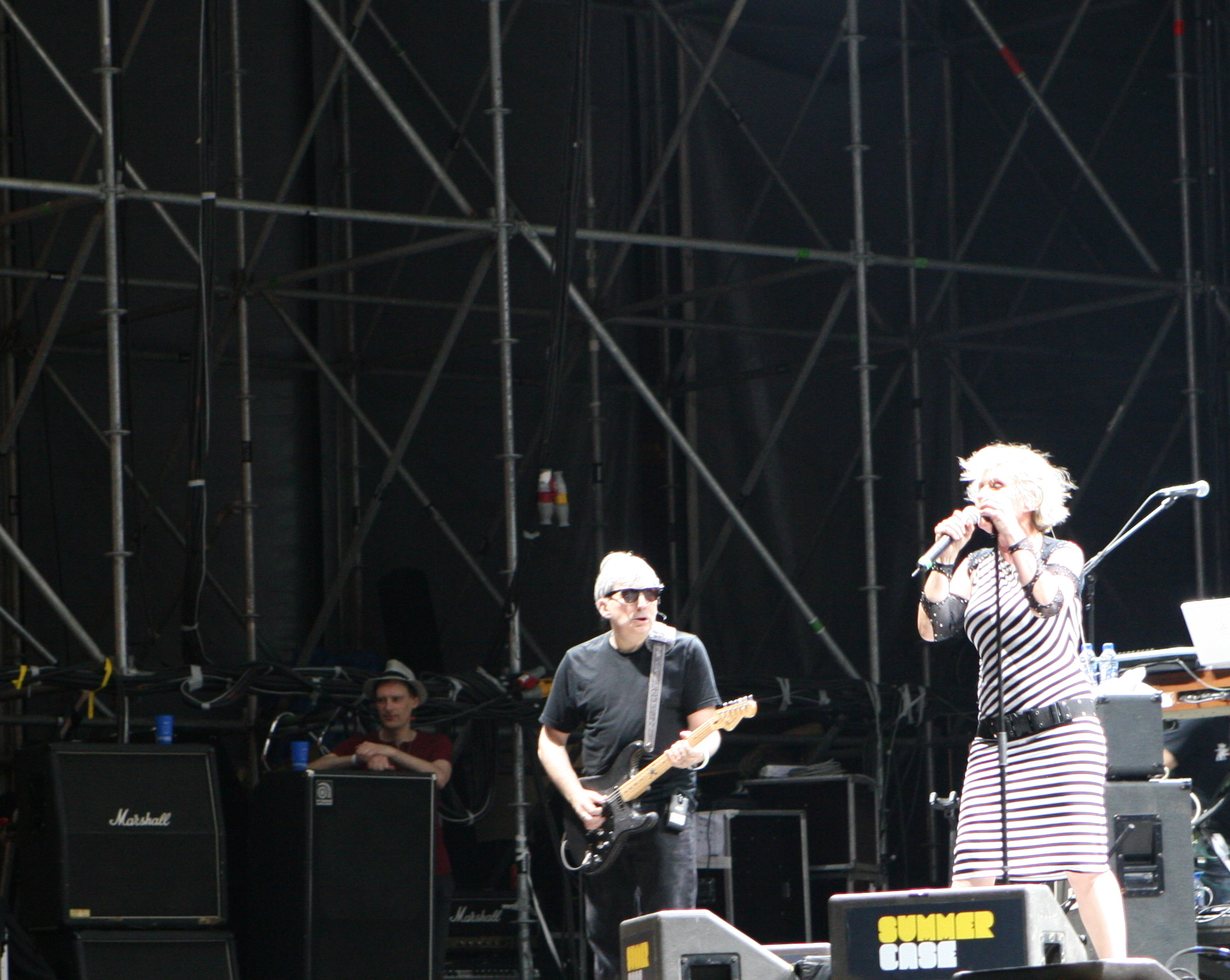 Podéis leer una crónica de todo el Summercase en nuestra web (You can read an account of all our Summercase site).